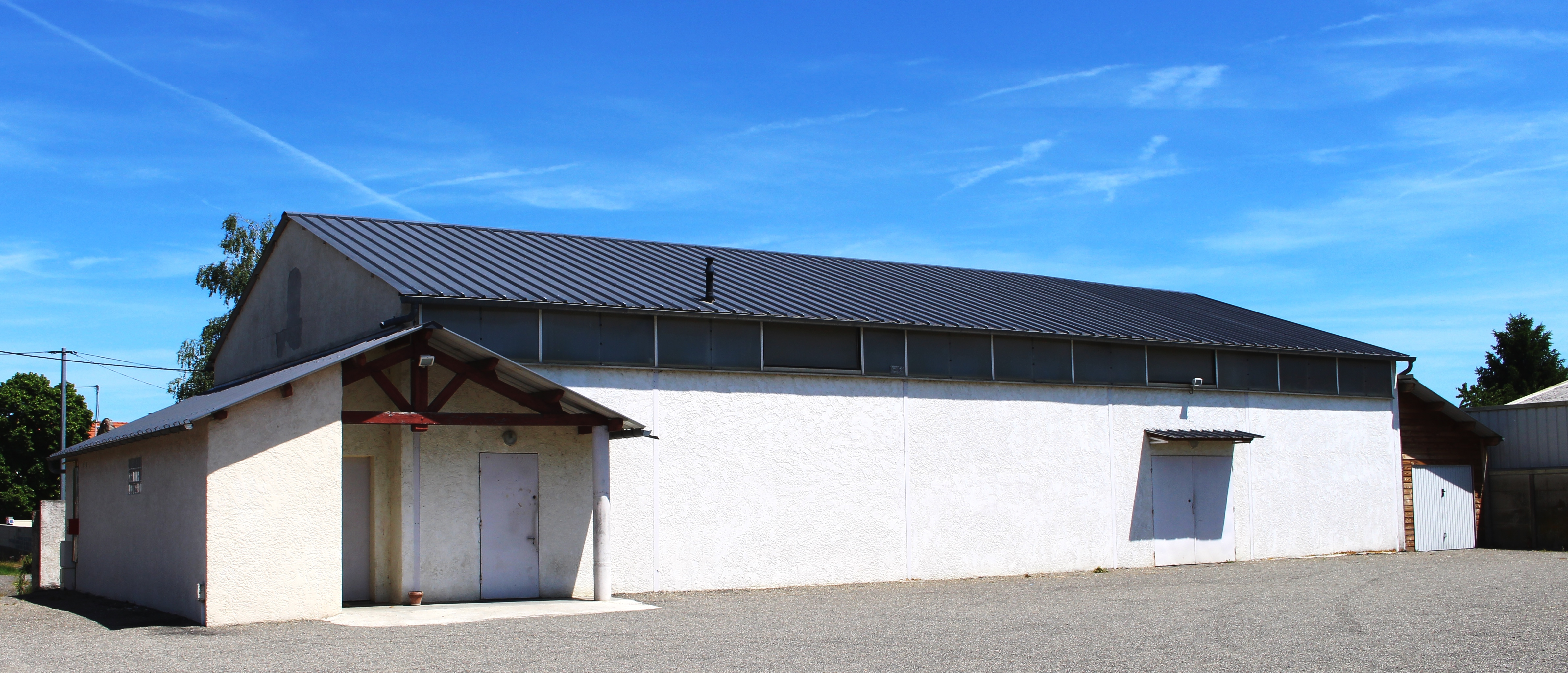 Salle des fêtes de Chis (Hautes-Pyrénées)